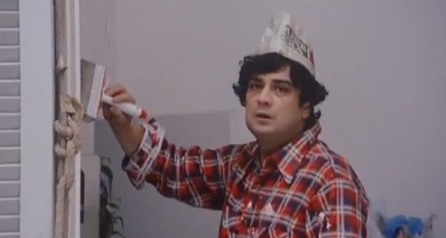 Screenshot di W la foca, regia di Nando Cicero (1982)